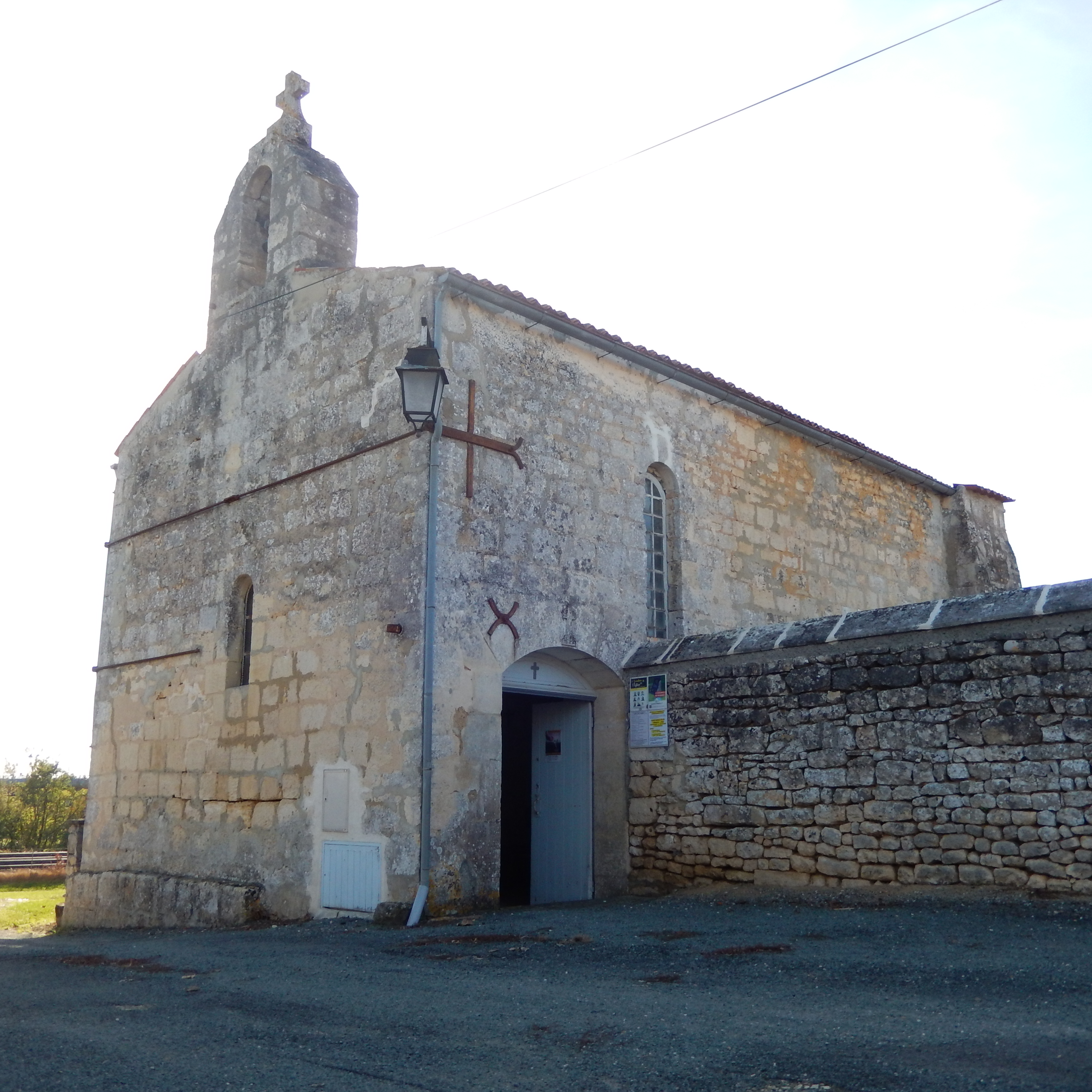 L'extérieur de l'église Saint-Germain d'Agonnay.